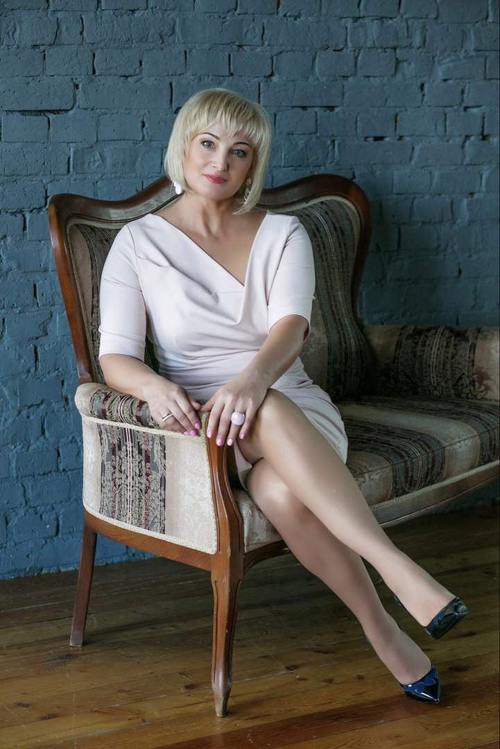 основоположница методики интимной гимнастики